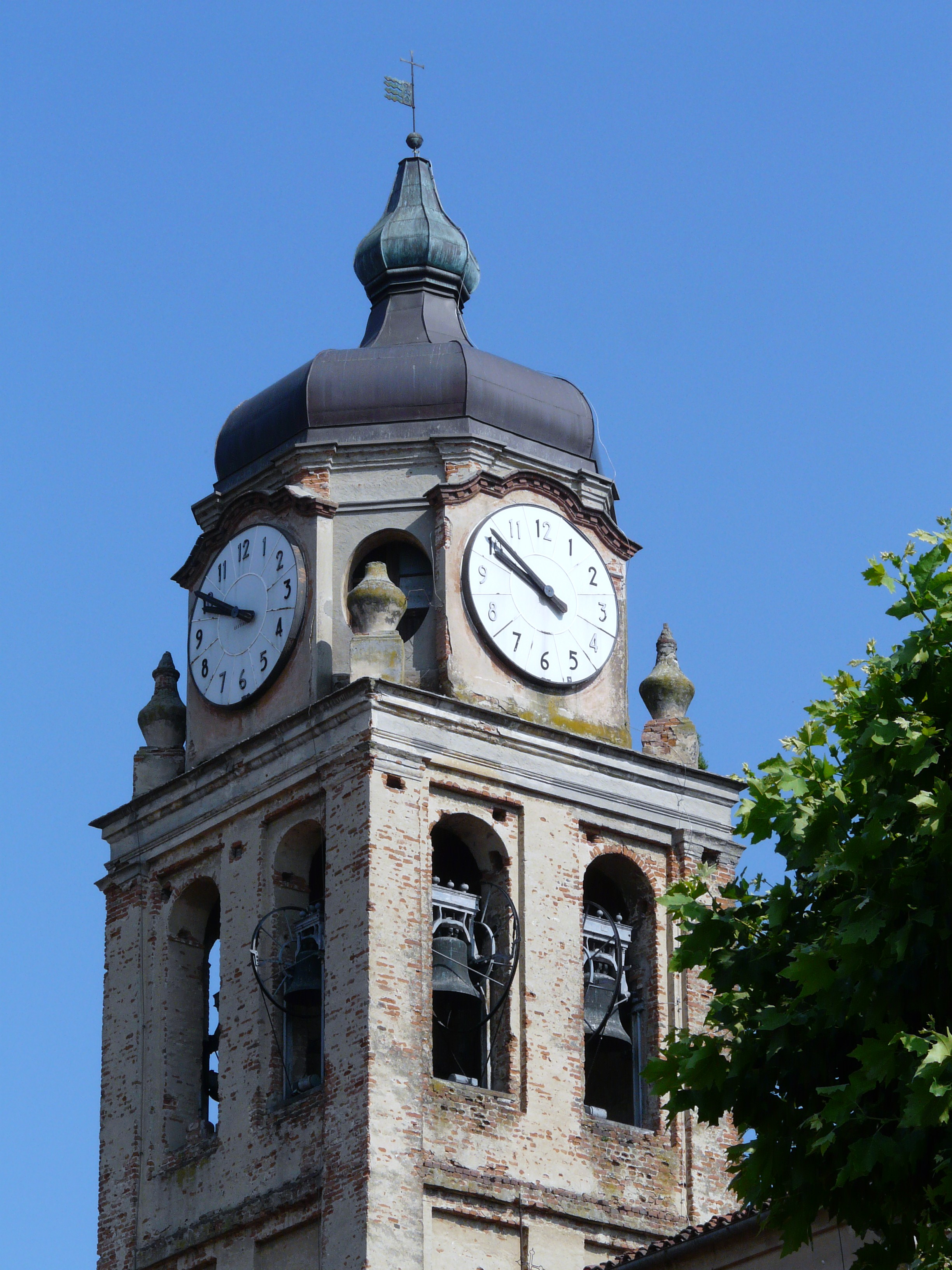 Chiesa di San Vincenzo, Mirabello Monferrato, Piemonte, Italia